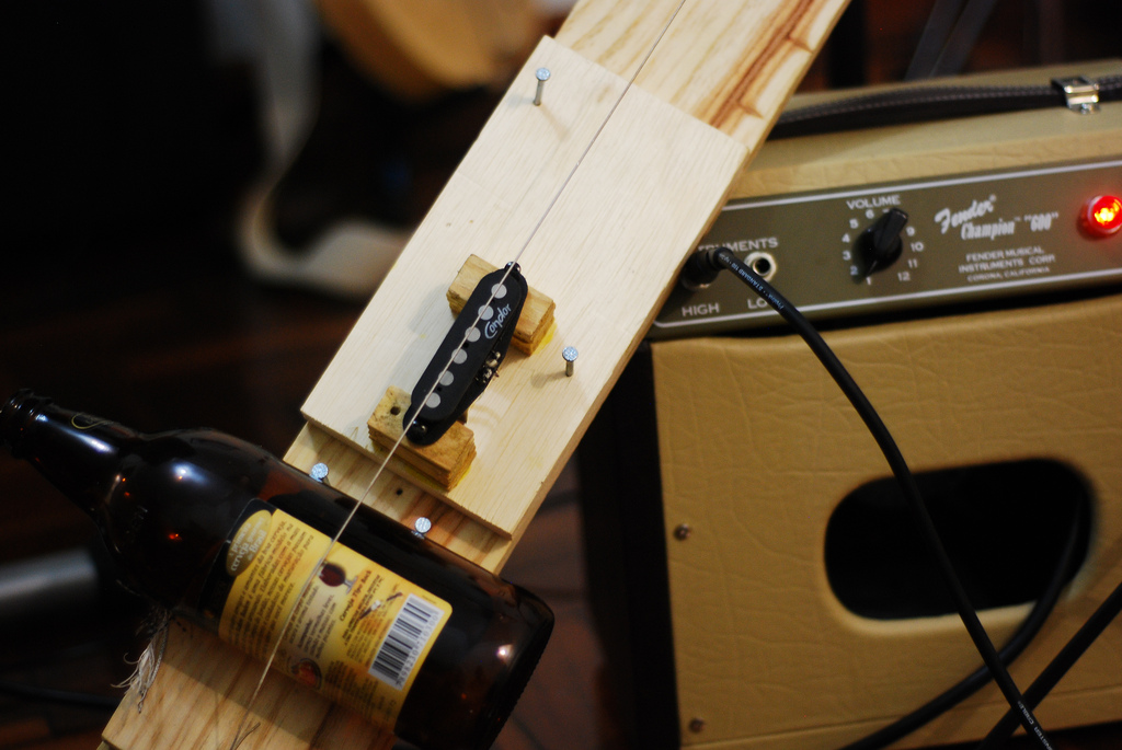 Diddley bow